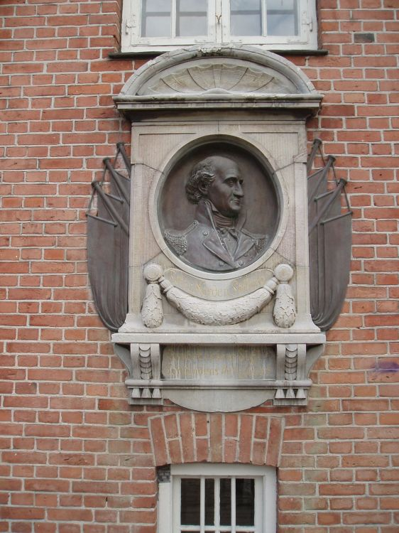 Bas-relief af Peter Norden Sølling på Christianshavn